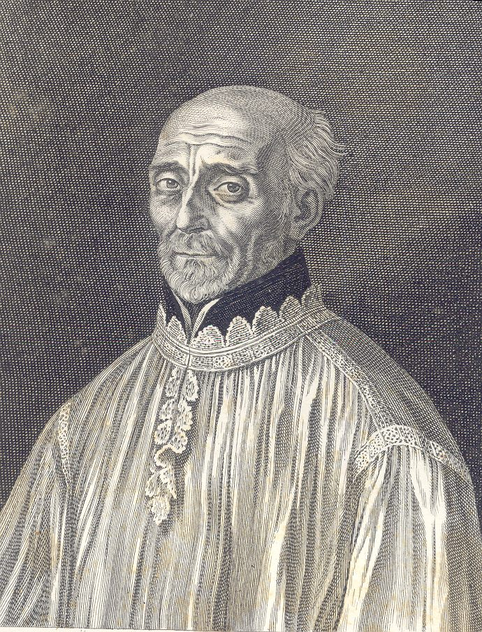 Étienne Binet est un prêtre jésuite francais, écrivain spirituel influent.